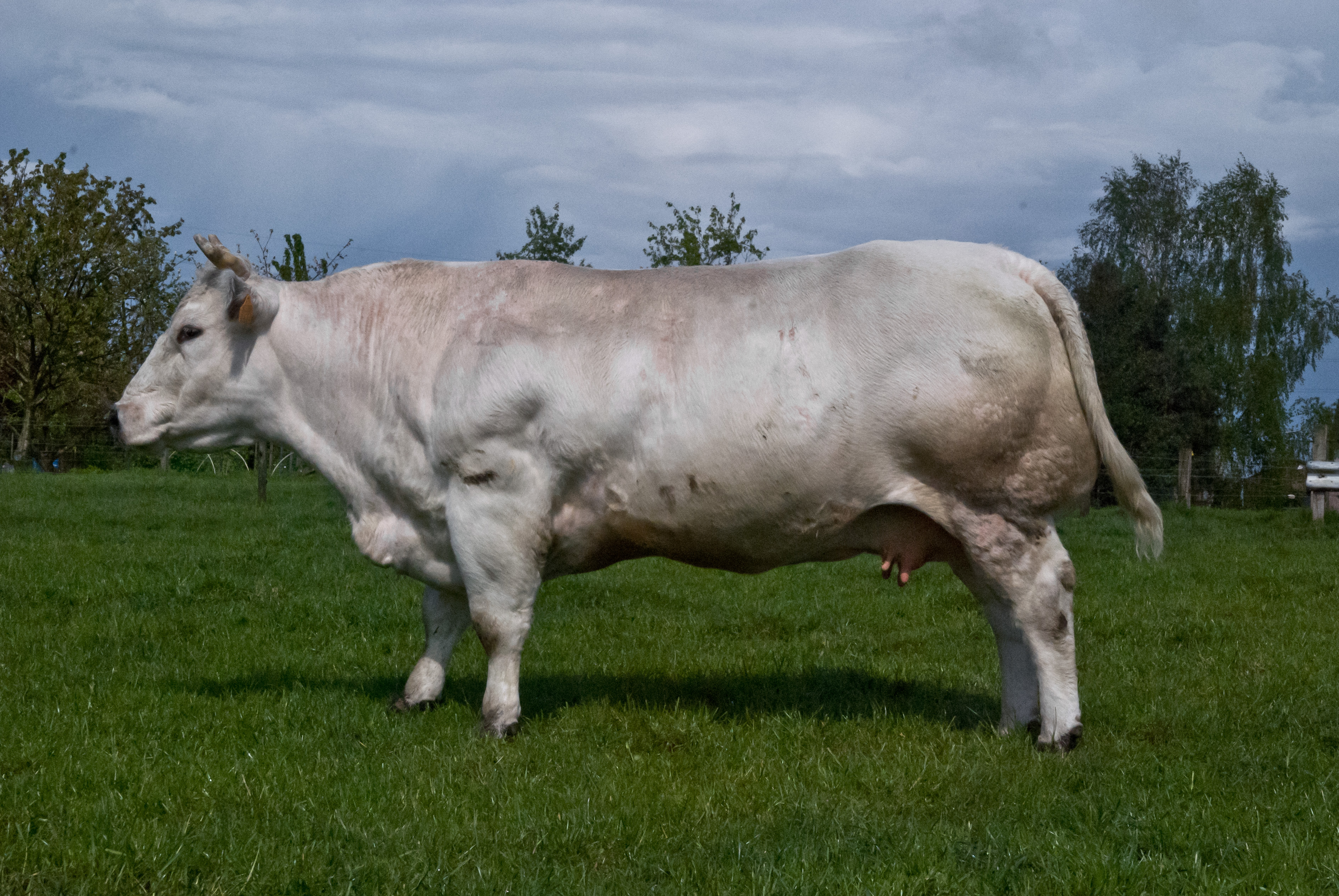 Koe van Belgisch blauwe ras.